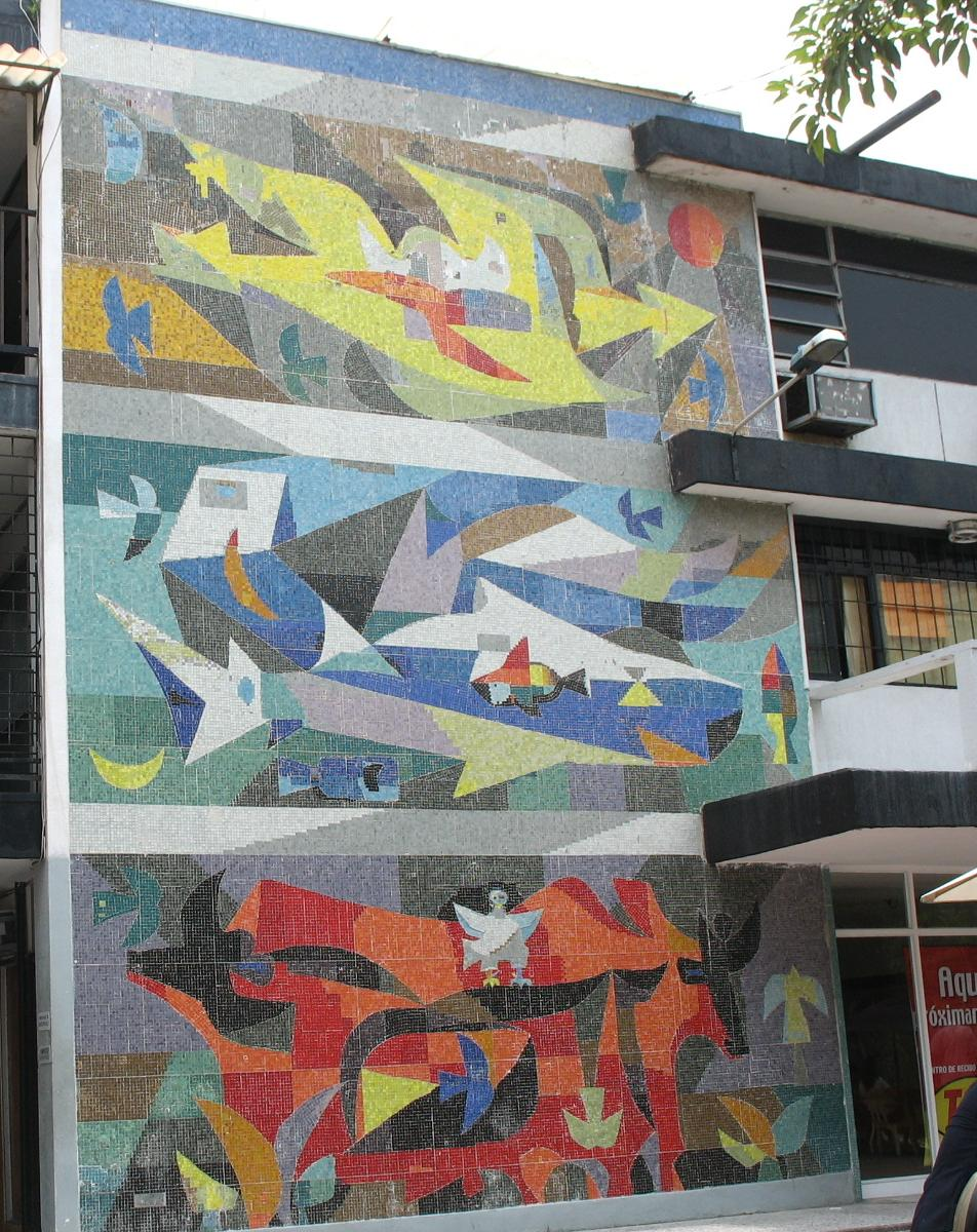 Mural de Alejandro Obregón, Barranquilla